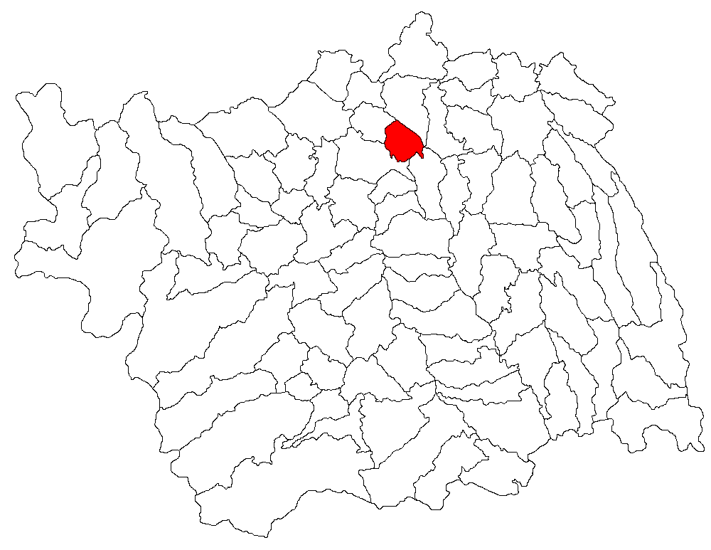 Categorie:Hărţi ale judeţului Bacău